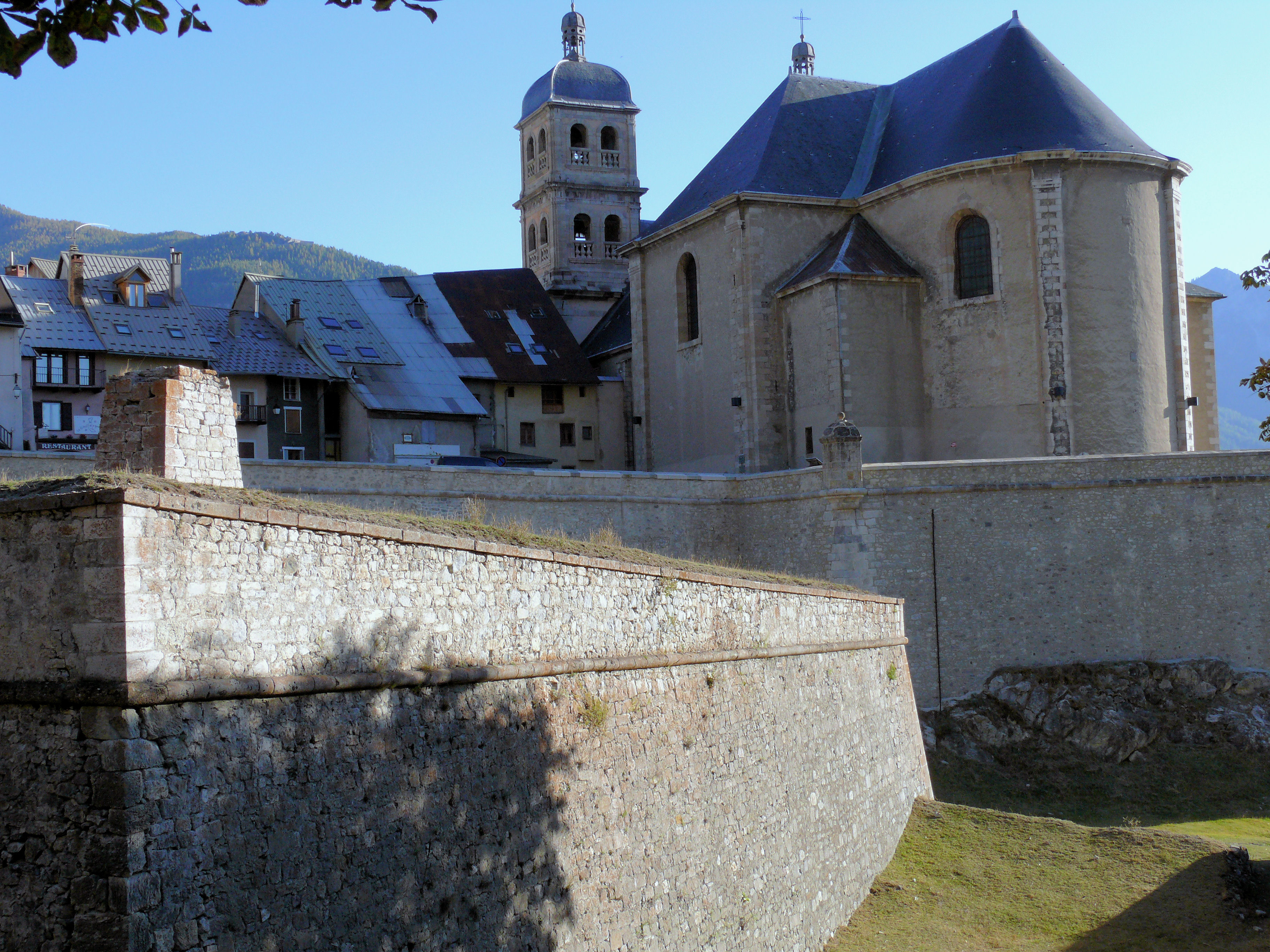 Remparts de Briançon - Demi-lune et rempart autour de la collégiale